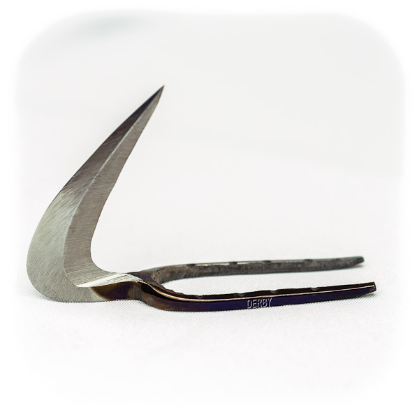 Navaga para pelea de gallos